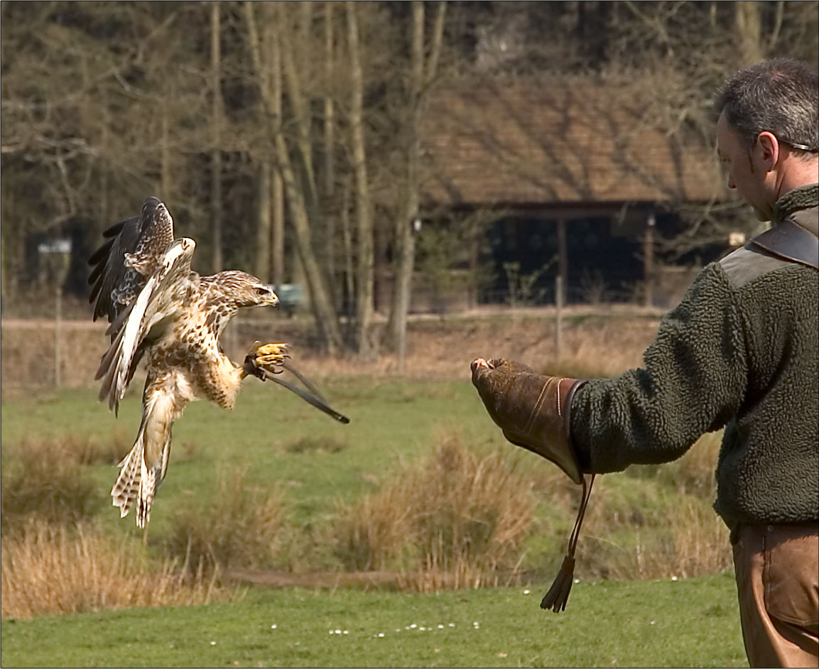 Buzzard Falcon being trained